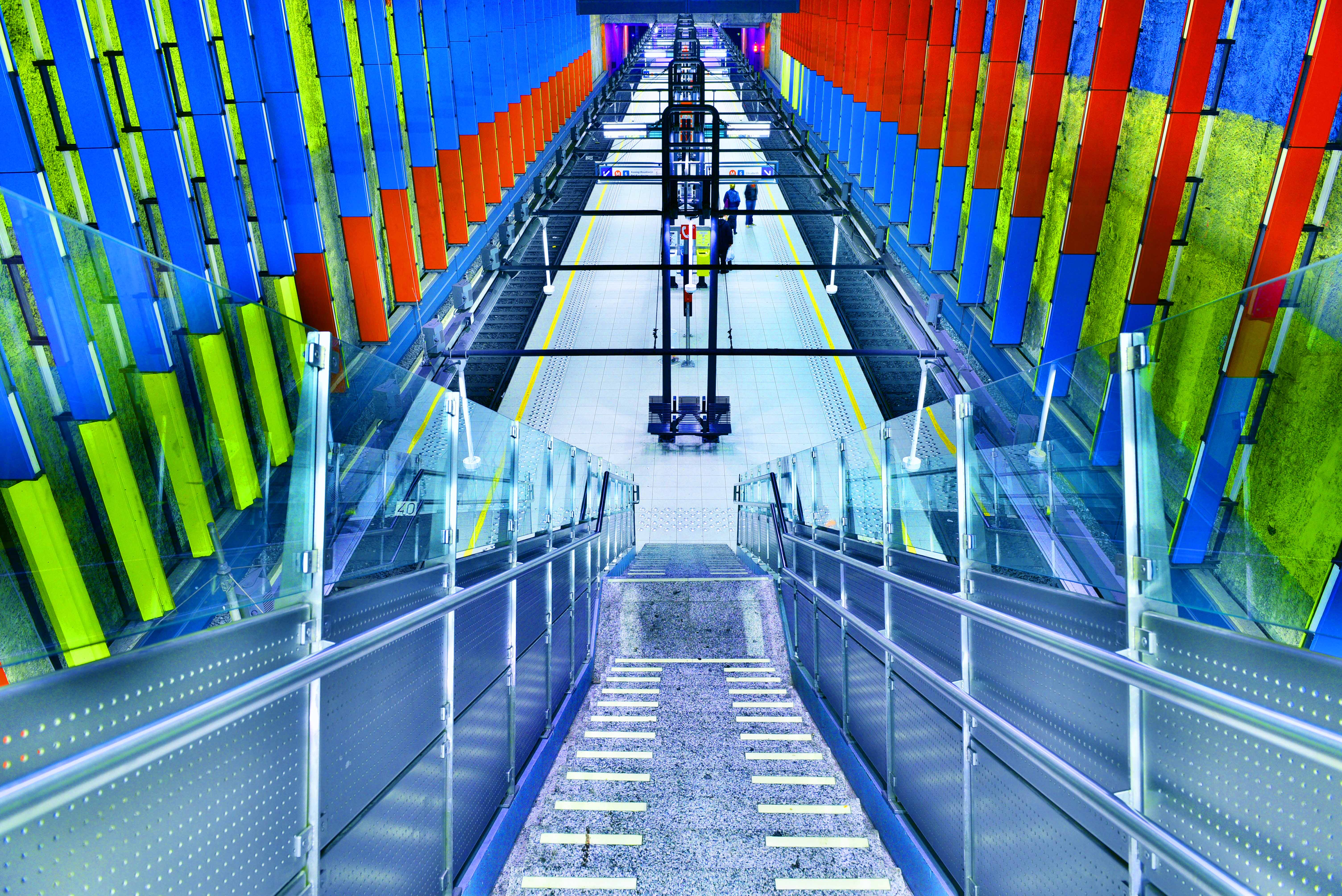 Station de métro Bockstael